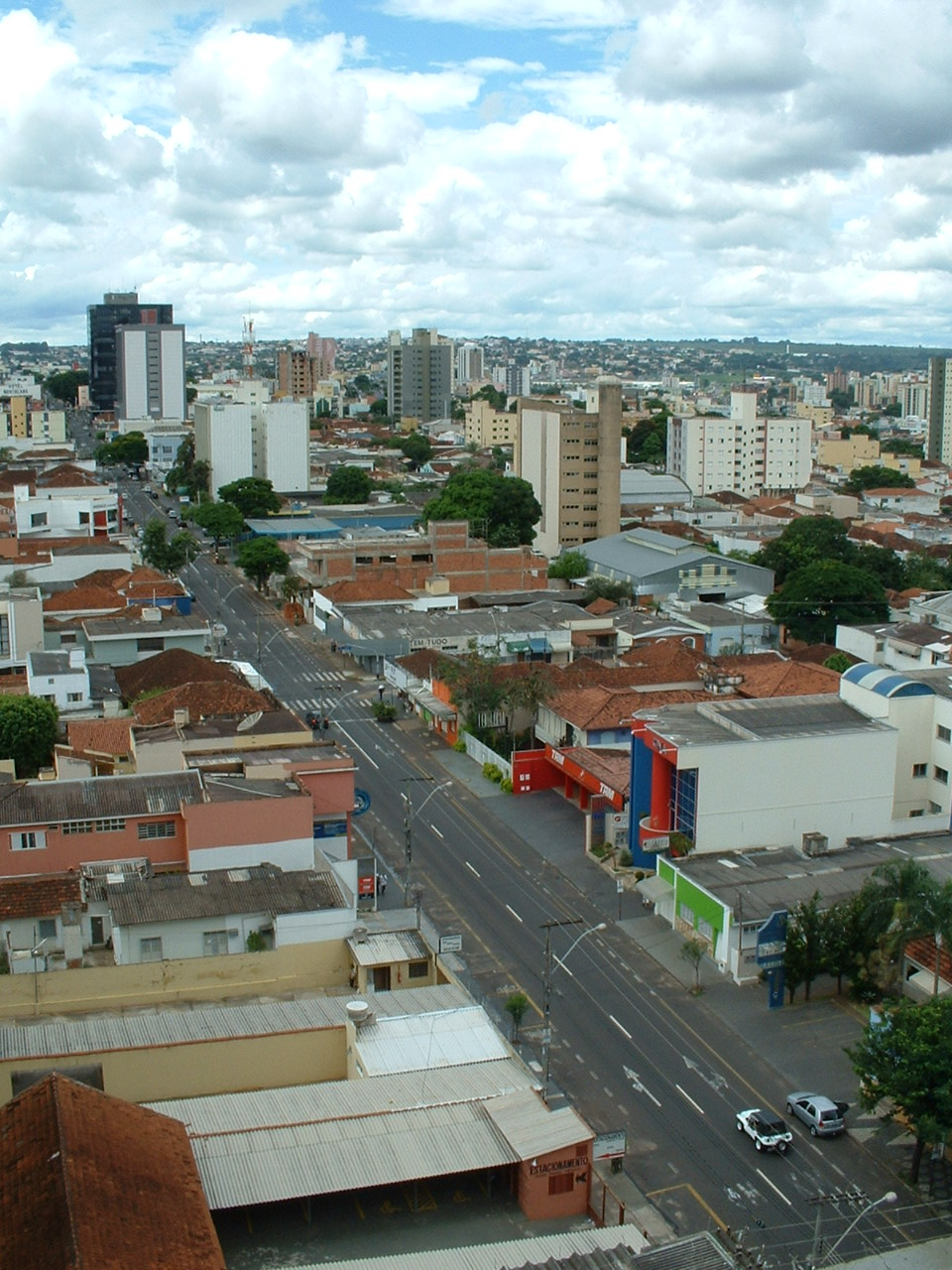 Avenida Césario Alvim, Uberlândia, Minas Gerais, Brasil. Vista do Edifício Longino Teixeira